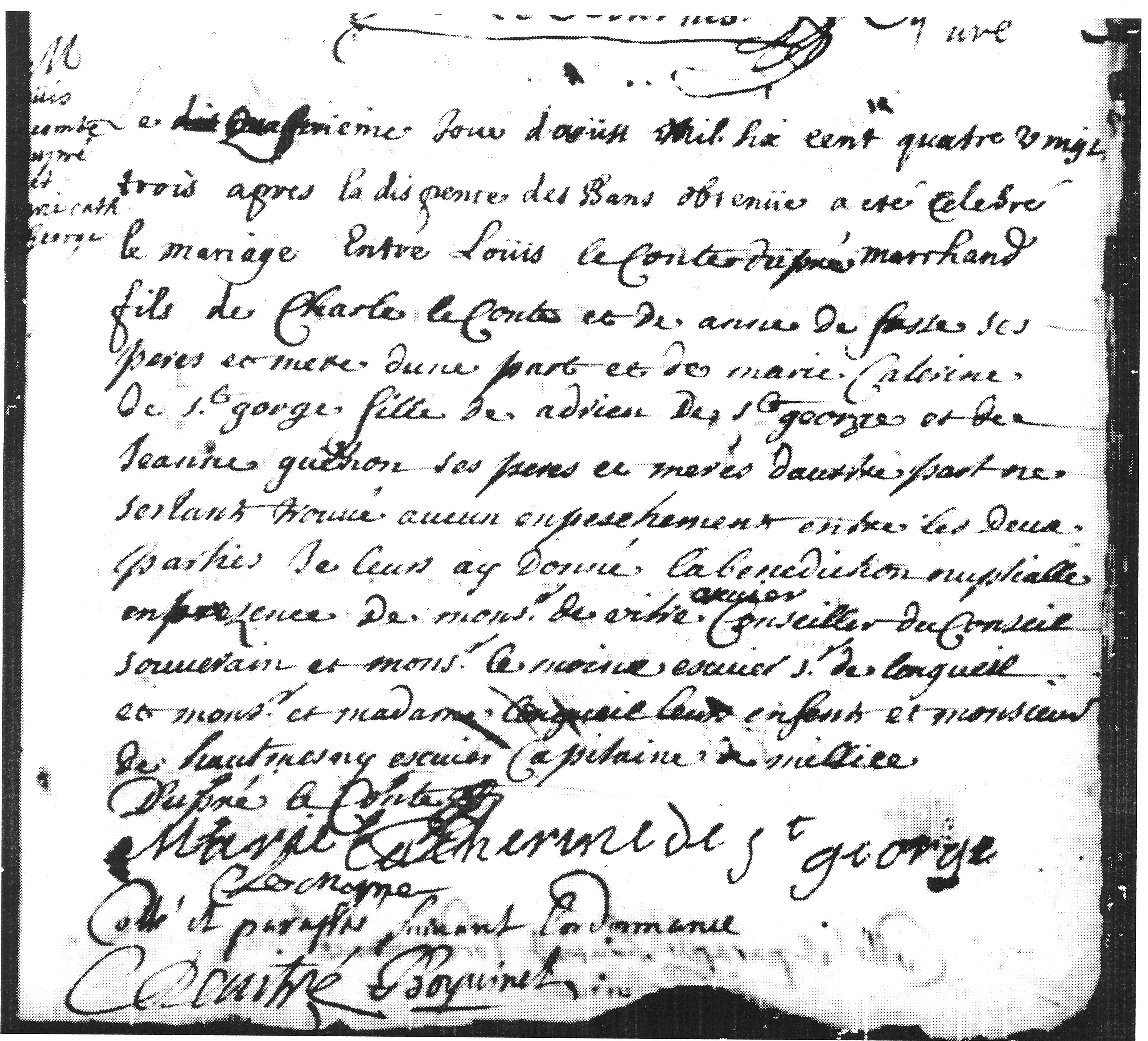 Contrat de mariage de Louis LeComte Dupré avec Marie-Catherine de Saint-Georges.